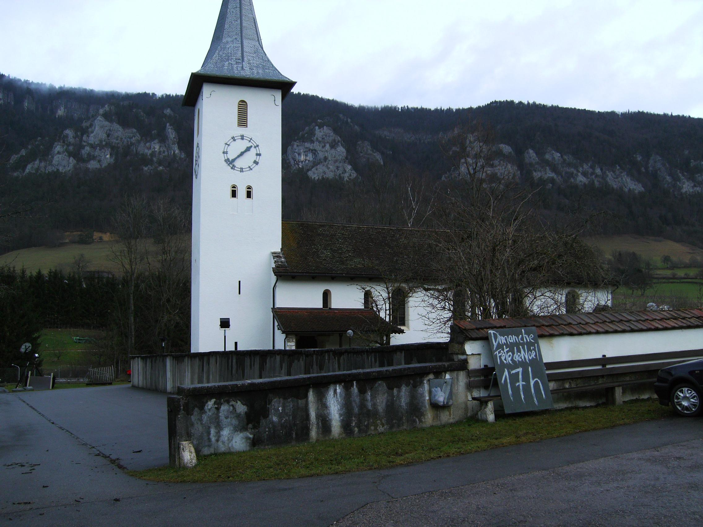 Eglise réformée de Grandval (BE, Suisse).